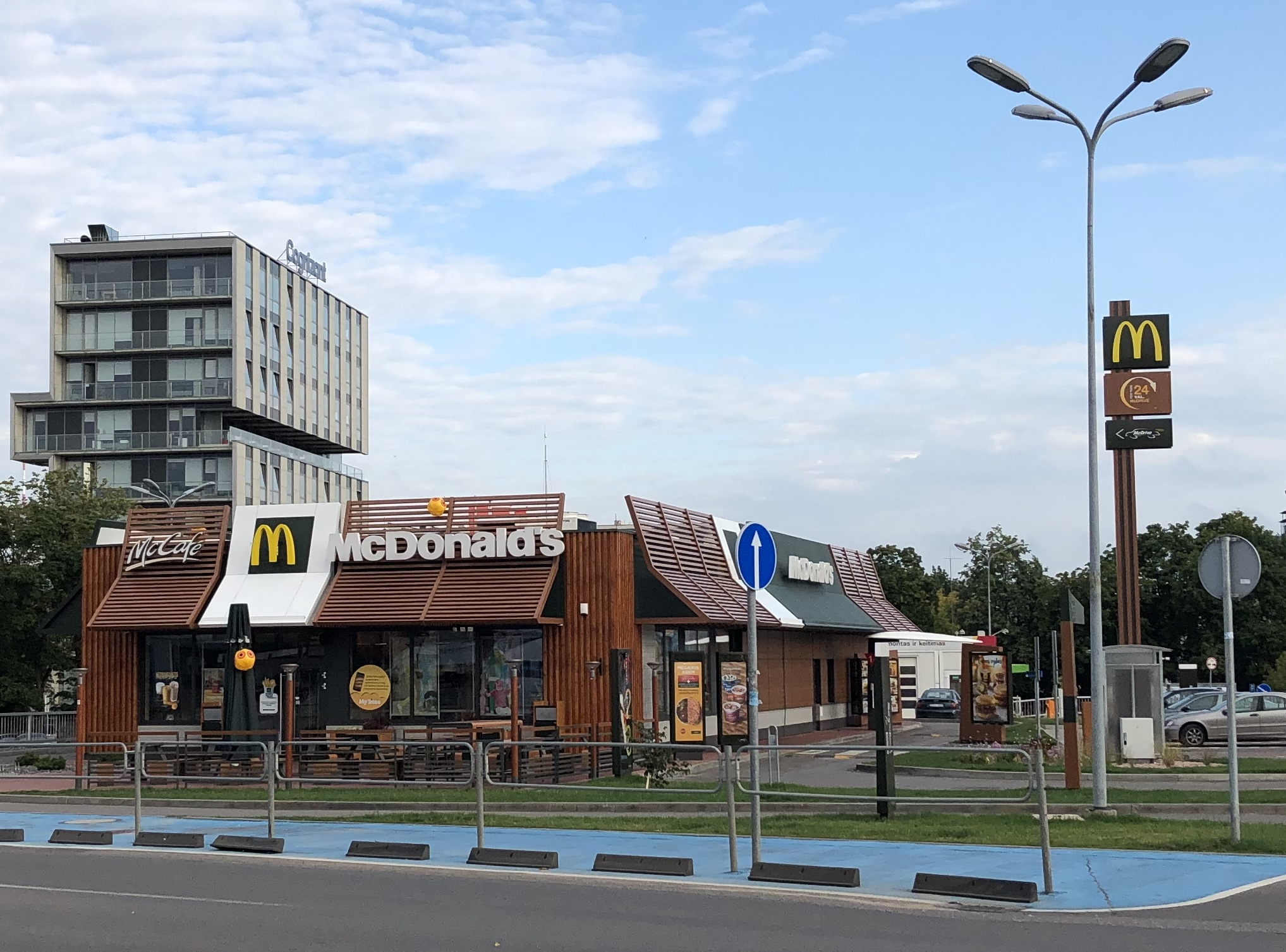 McDonald's restoranas Vilniuje, Naujamiestyje. Adresas: Kedrų g. 2A, Vilnius, LT-03159